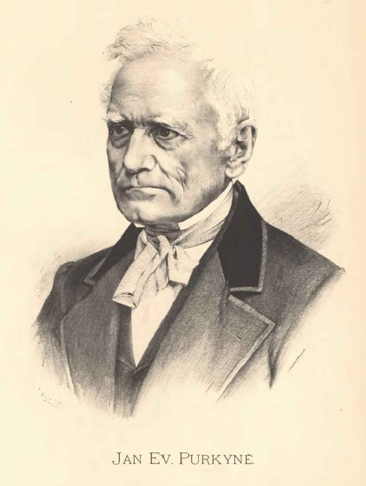 Portréty předních osobností od Jana Vilímka